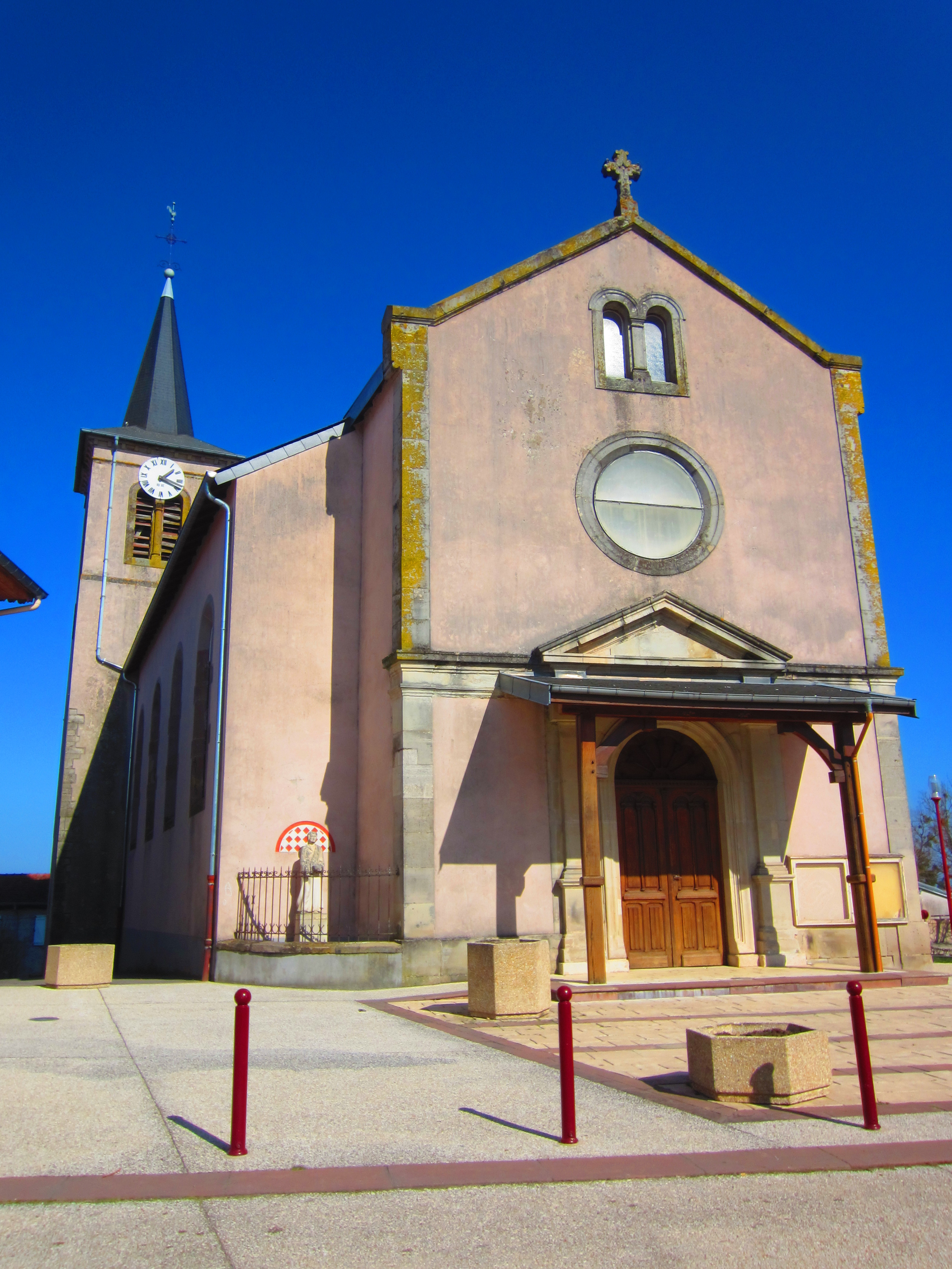 Herimenil eglise